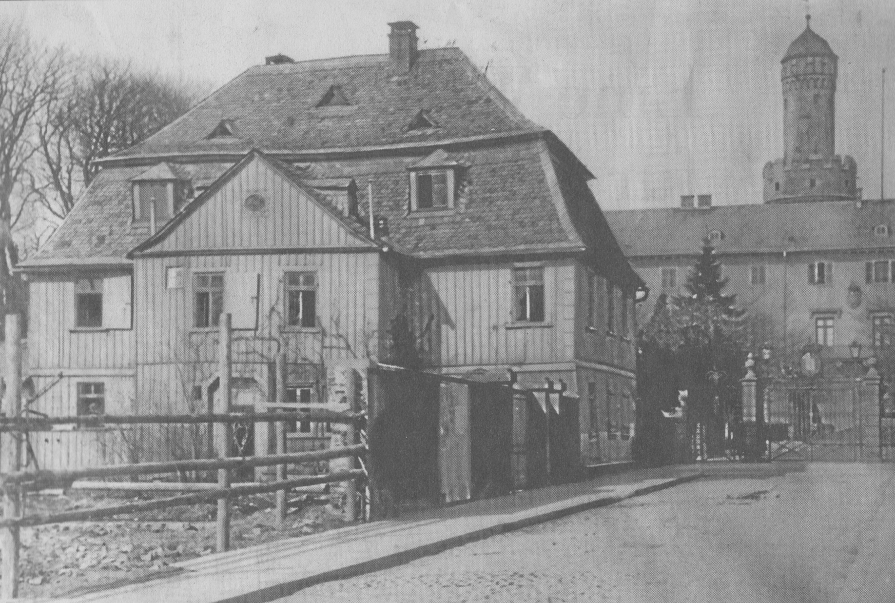 Anwesen Dorotheenstraße 1 in Bad Homburg vor dem Bau der Erlöserkirche, ehemaliges Landratsamt des Obertaunuskreises